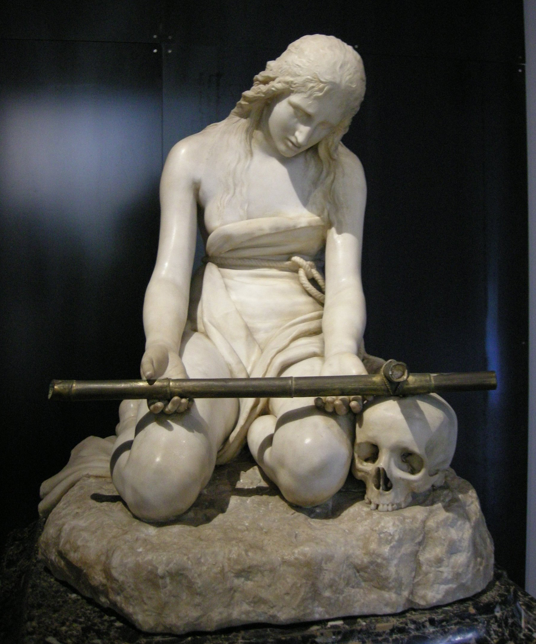 Canova, maddalena penitente